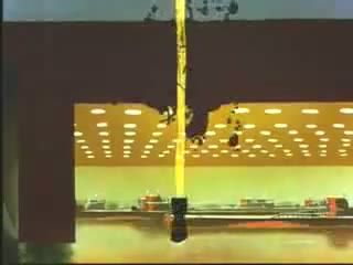 Imatges del tràiler de la pel·lícula "Victory Trough Air Power". Els tràilers de les pel·lícules publicats abans de 1964 als Estats Units es troben en domini públic